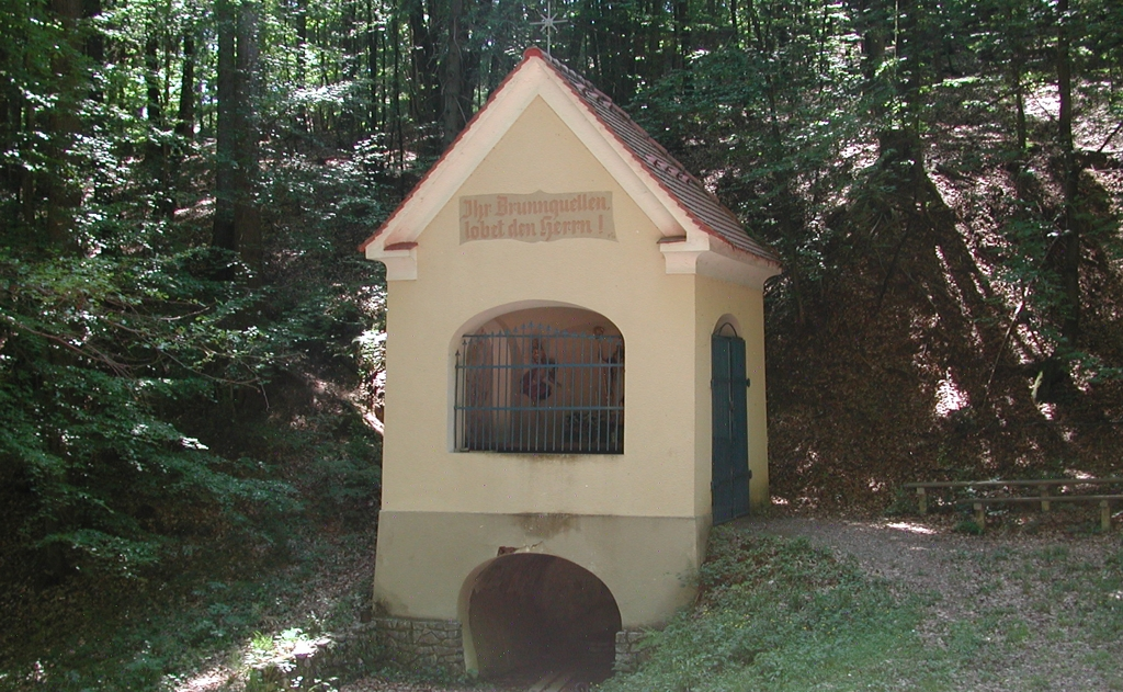 Ulrichskapelle bei Markt Hartmannsdorf